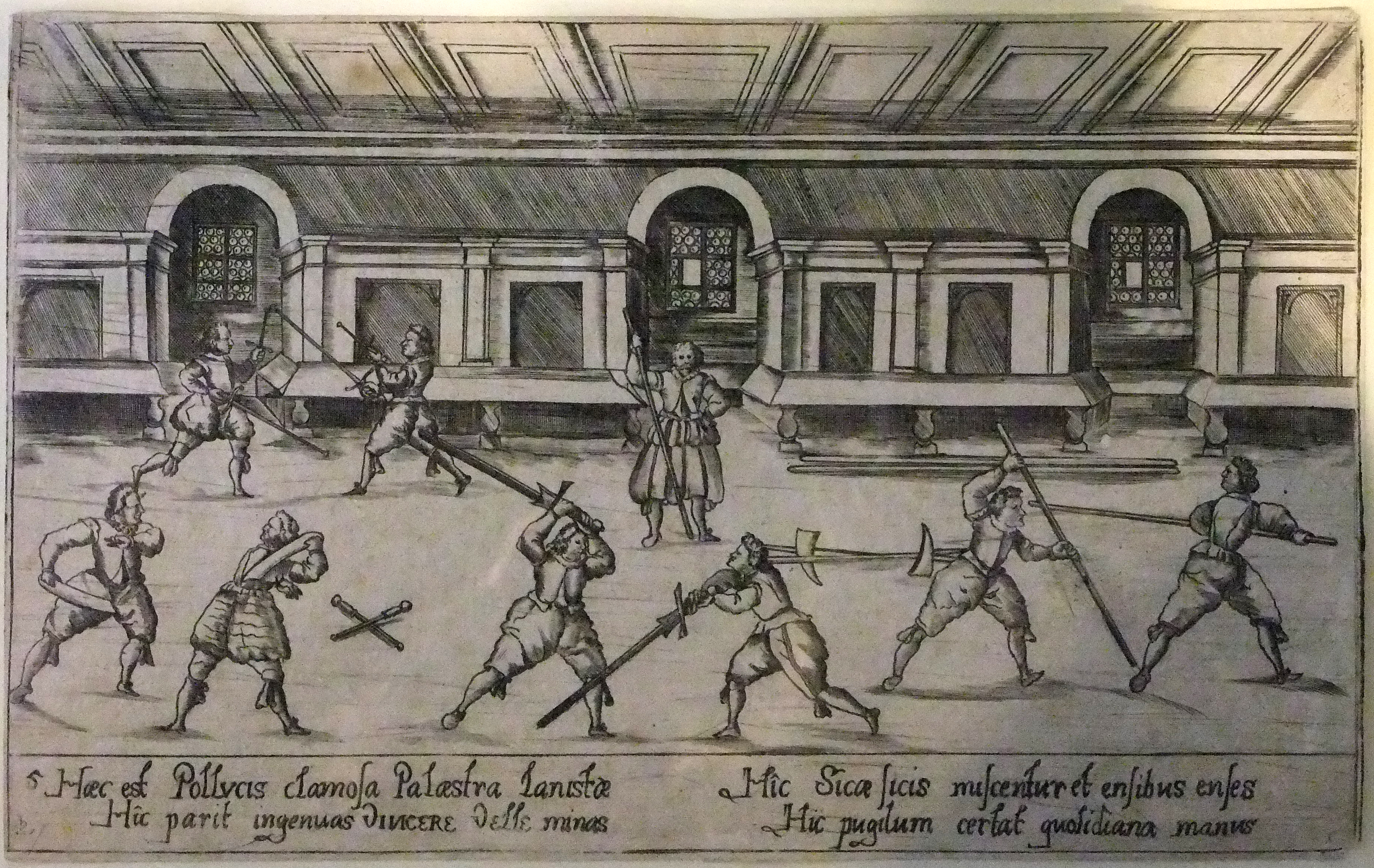 Collegium Illustre. Kampfunterricht (Radierung; Stadtmuseum Tübingen Inv. 1086)